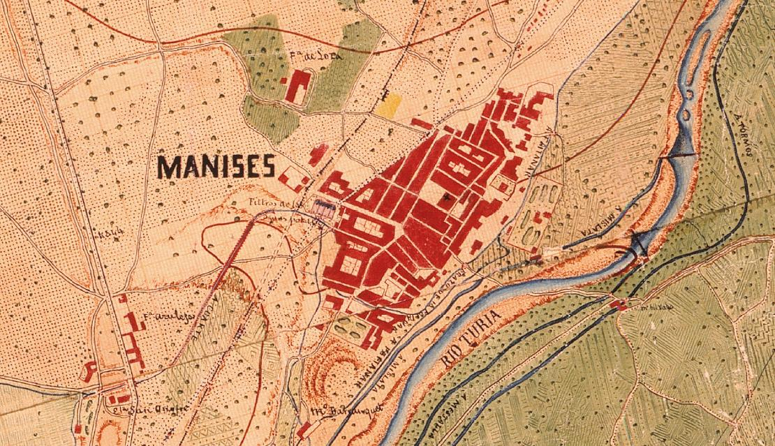 Manises el 1883 (el nord està a la dreta).